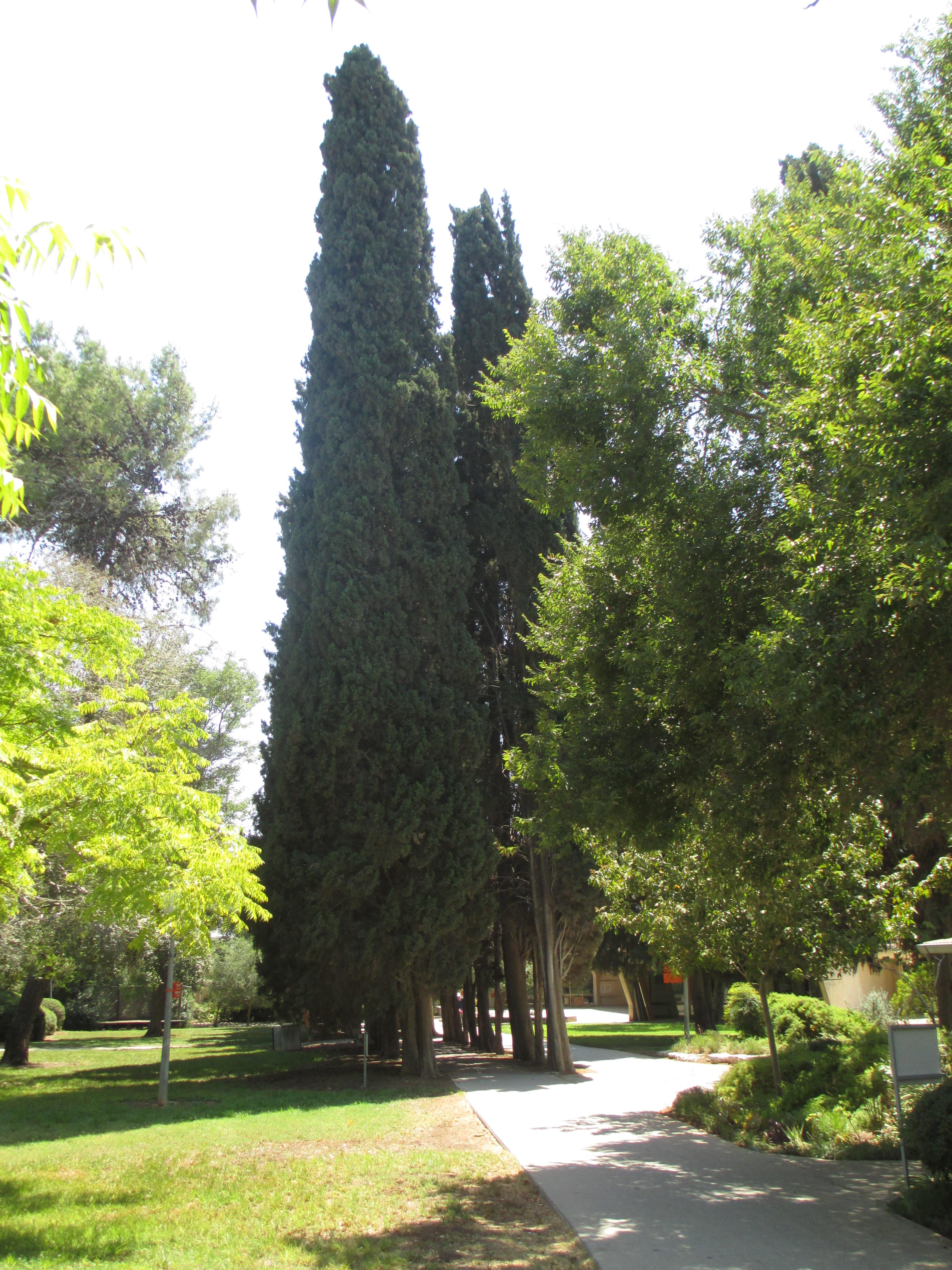 שדרת הנשיקות במזרע